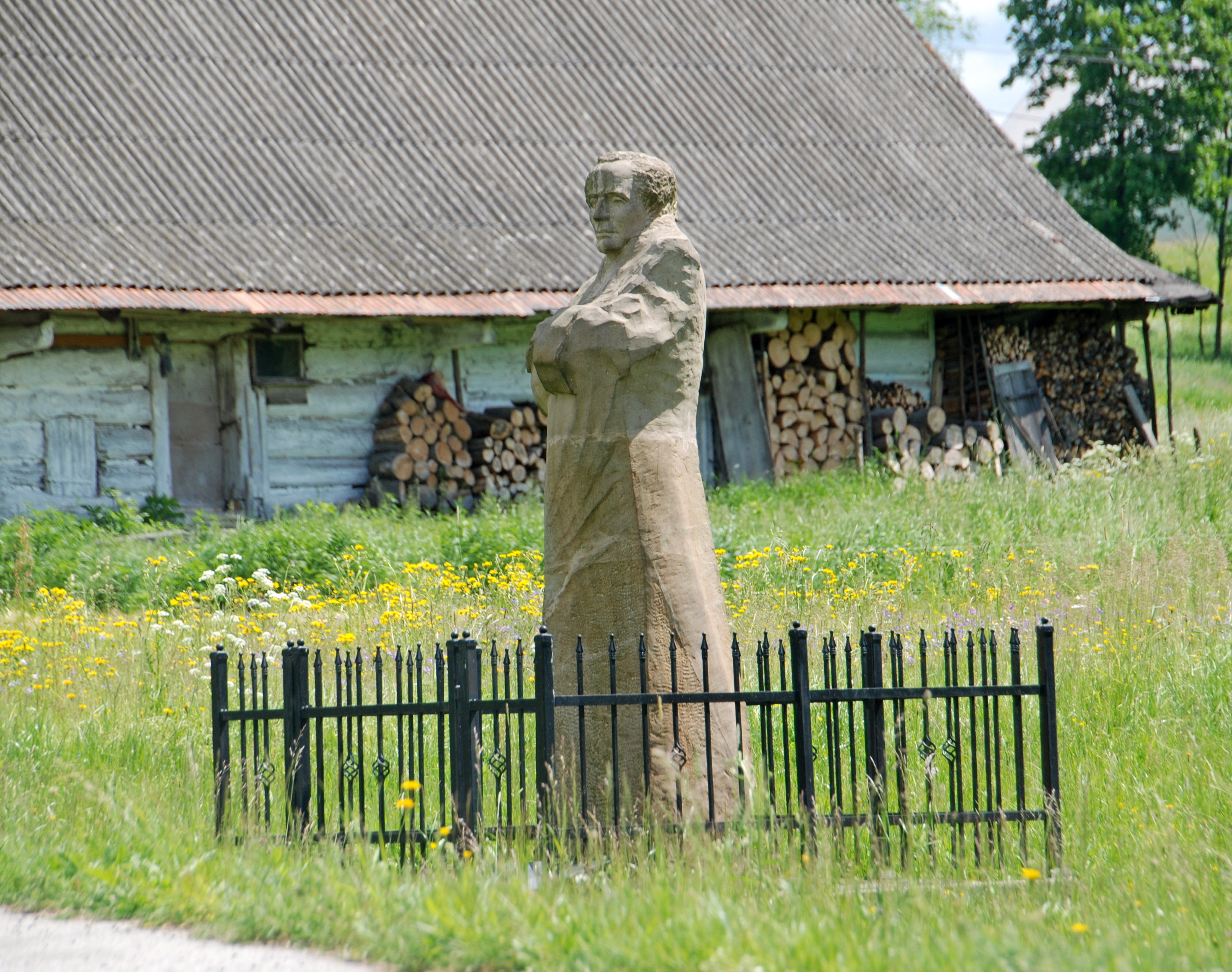 wieś Bartne